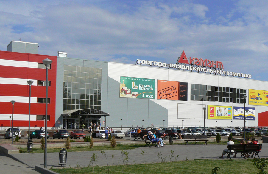 ТРК Диамант в Тракторозаводском районе Волгограда